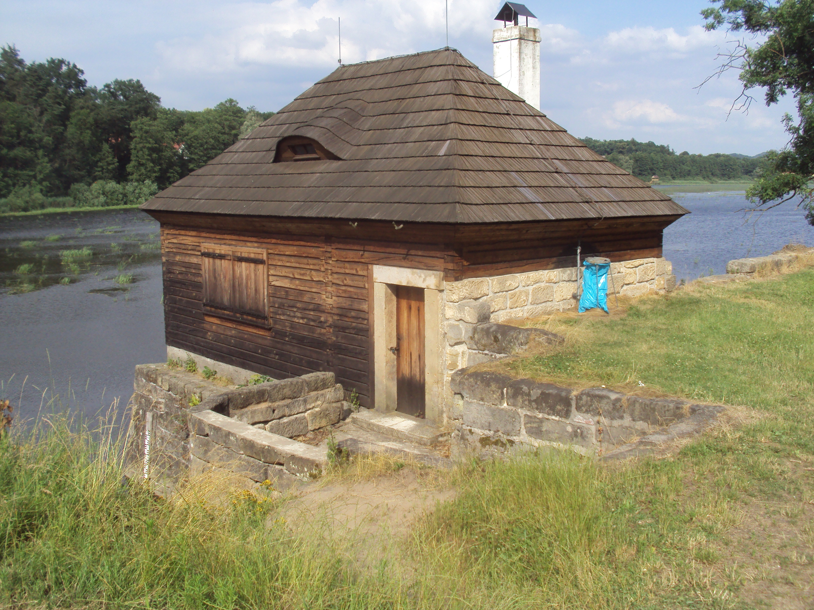 Rybářský domek nad rybníkem